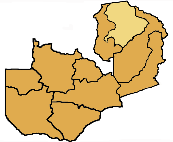 Mappa dell'arcidiocesi di Kasama, in Zambia. Lavoro personale, eseguito a partire da questa immagine di Commons. Fonte per i confini: Guida delle missioni cattoliche 2005, a cura della Congregatio pro gentium evangelizatione, Roma, Urbaniana University Press, 2005. Categoria:Chiesa cattolica in Zambia Categoria:Mappe dell'Africa